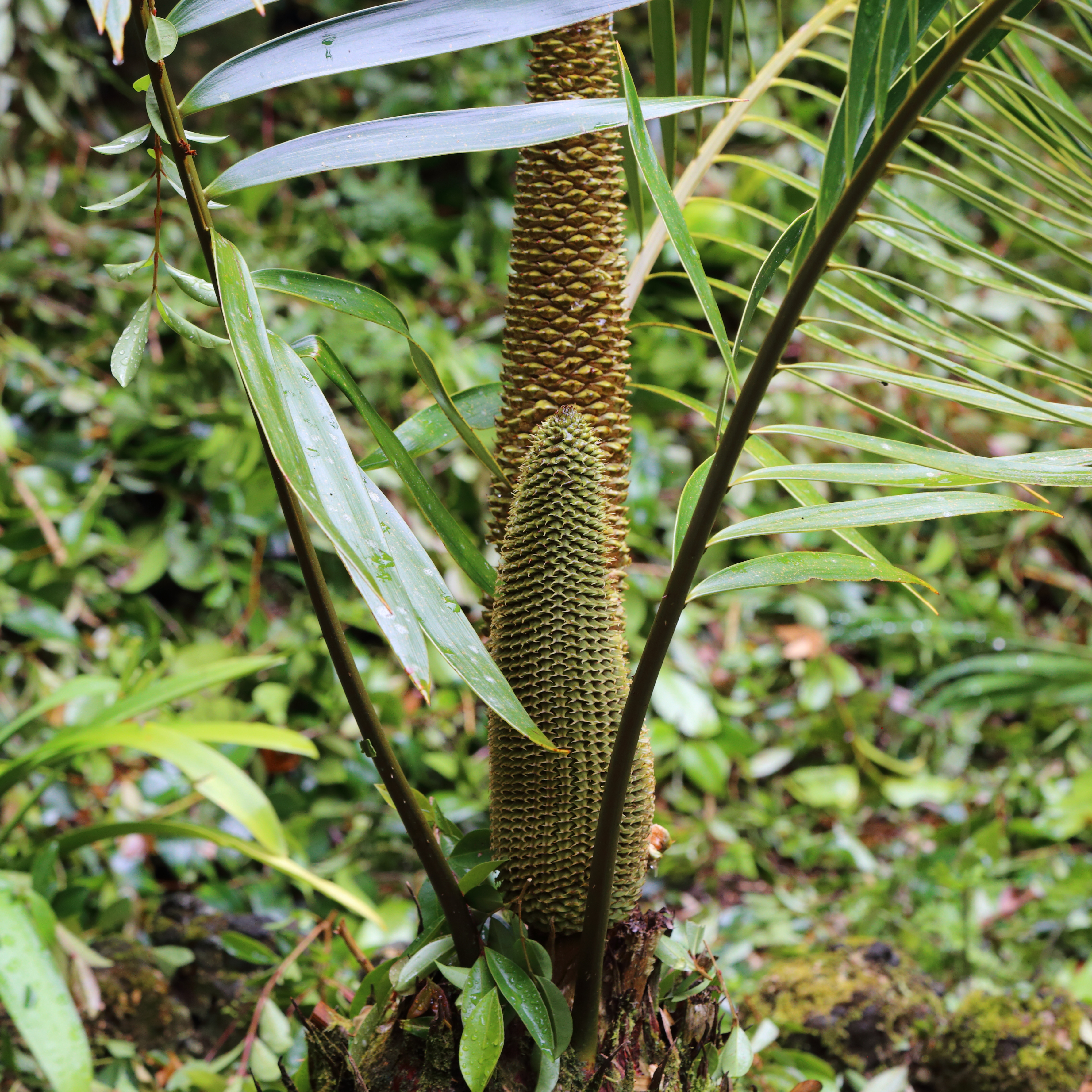 Ceratozamia latifolia i Terra Nostra, Furnas, São Miguel, Azorerna.